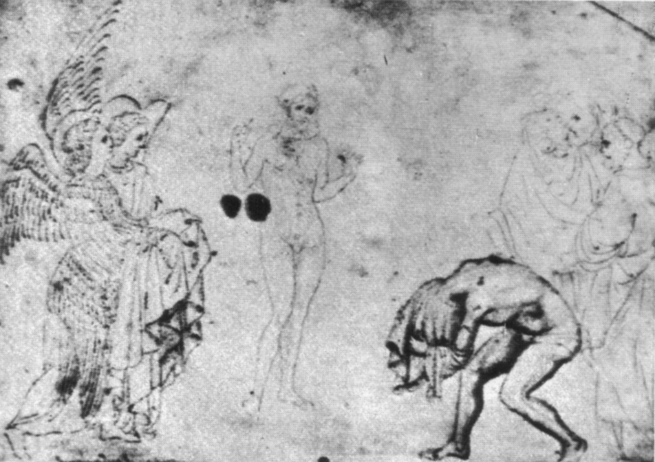 Pisanello, disegni, louvre 420r.jpg